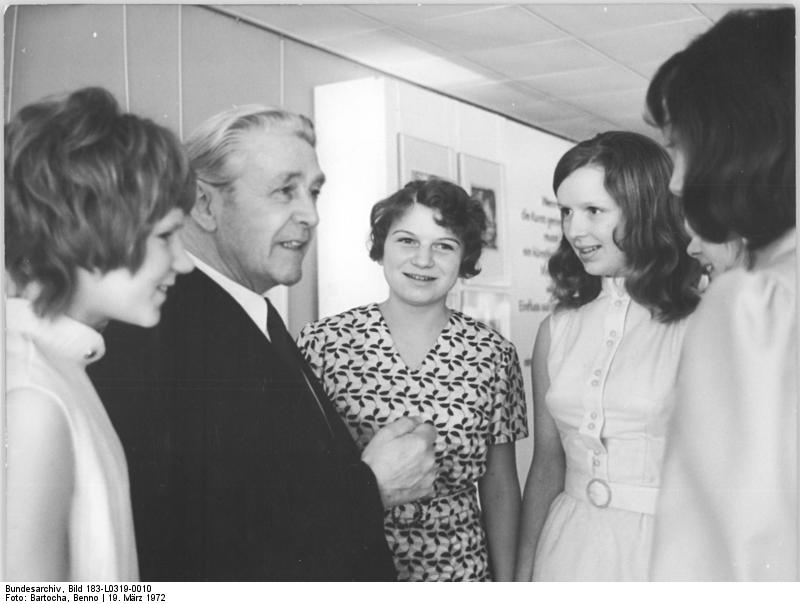 Neubrandenburg, Jugendweihe, Hans Jendretzky ADN-ZB Bartocha 19.3.1972 Neubrandenburg: Jugendweihfeier mit Hans Jendretzky-55 Mädchen und Jungen der POS "Arthus Becker" erhielten am 19.3.1972 im Festsaal des Hauses der Kultur und Bildung der mecklenburgischen Bezirksstadt ihre Jugendweihe. - Herzliches Gespräch mit Hans Jendretzky, Mitglied des ZK der SED, im Foyer des Hauses. (Weiteres siehe ADN-Meldg.)